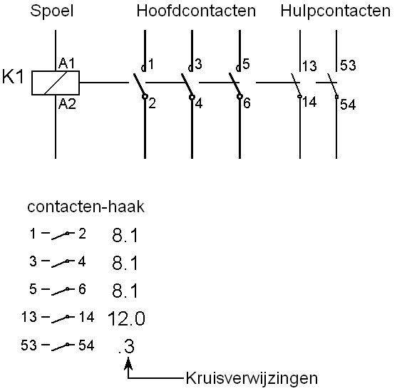 Voorstelling van de verschillende delen van een contactor in het elektrisch schema: spoel, hoofdcontacten, hulpcontacten en de contacthaak met de kruisverwijzingen waar de contacten in het schema terug te vinden zijn.